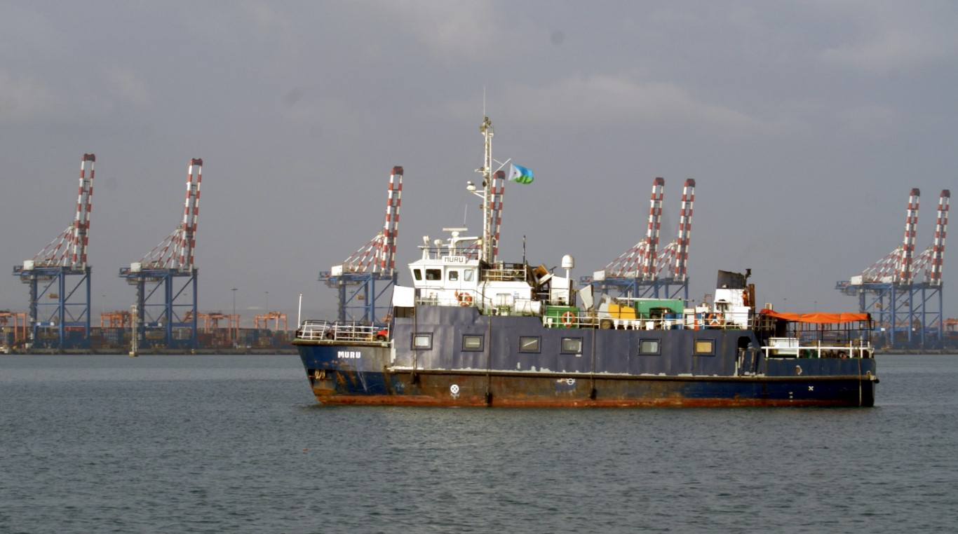 Muru (entinen Mursu) -laiva Djiboutin satamassa tammikuussa 2019.